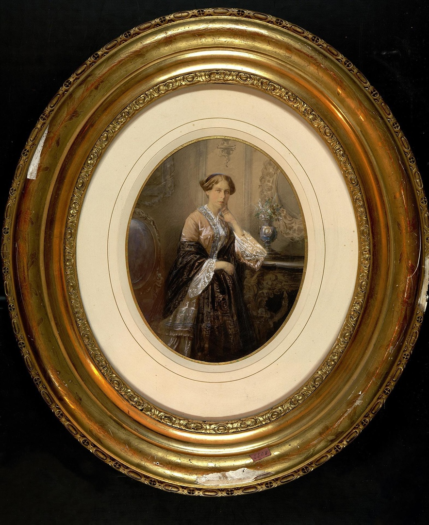 Княгиня Е. С. Мещерская, первая жена А. В. Мещерского. Портрет неизвестного художника XIX века